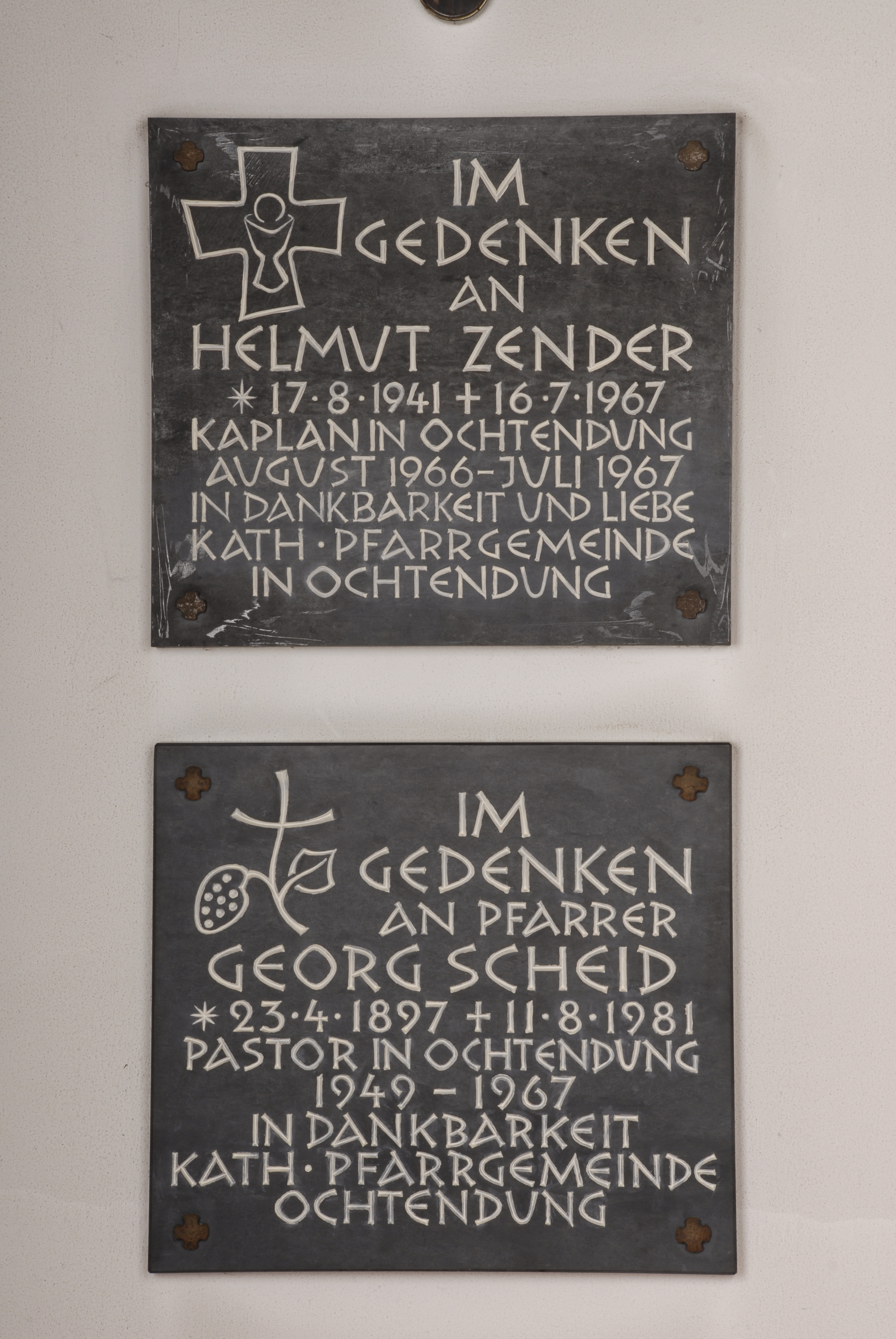 Die Bodenplatten erinnern an die Menschen, die wesentlich beim Neubau der Kirche beteiligt waren